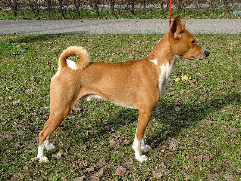 KINZICA GIOTTO nato il 16/12/2001, campione italiano di bellezza proclamato il 15/09/2004 e campione internazionale di bellezza proclamato il 02/11/2005.